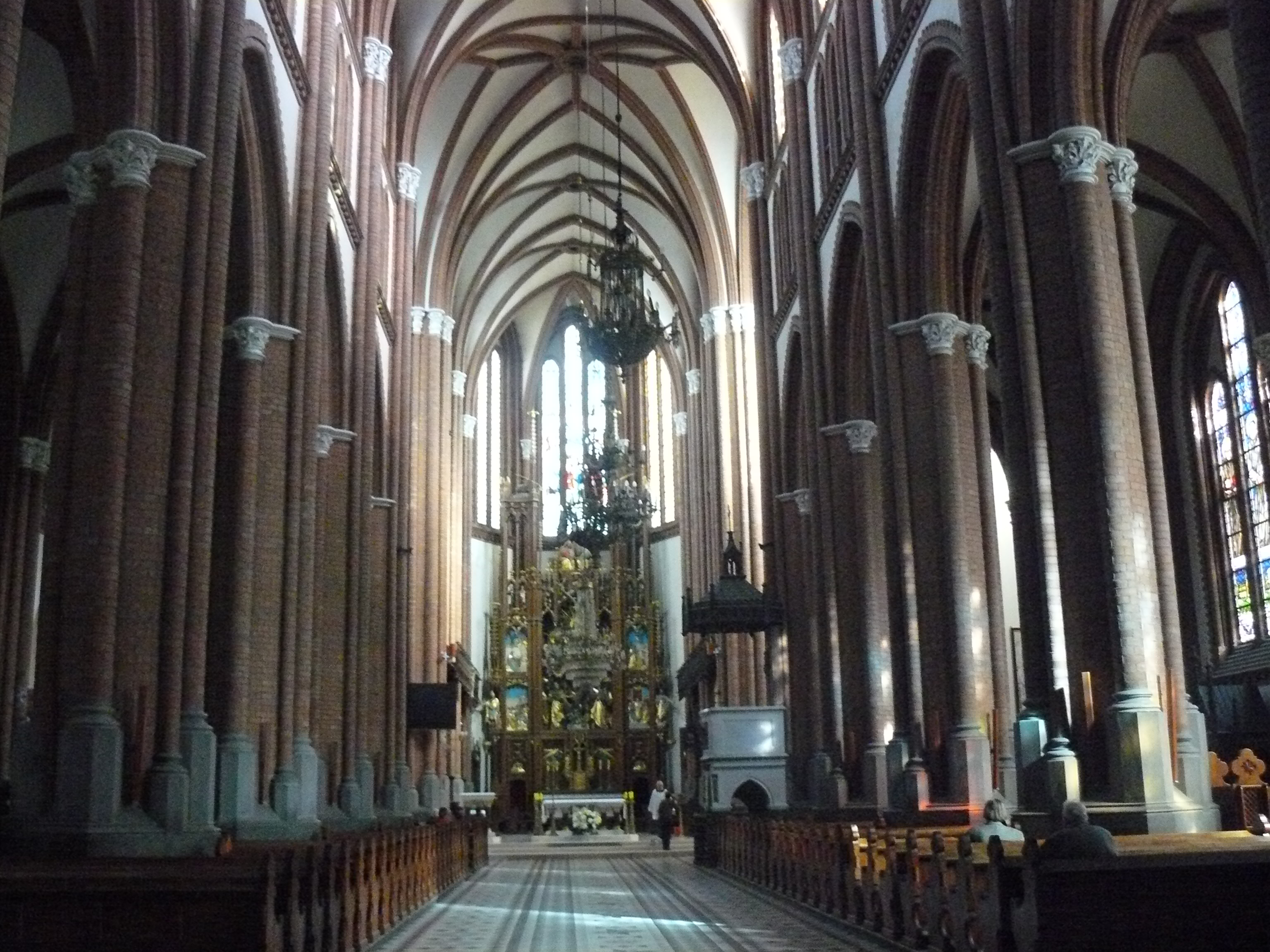 Białystok - Bazylika archikatedralna Wniebowzięcia NMP (zabytek nr A-192 z 28.01.1980)